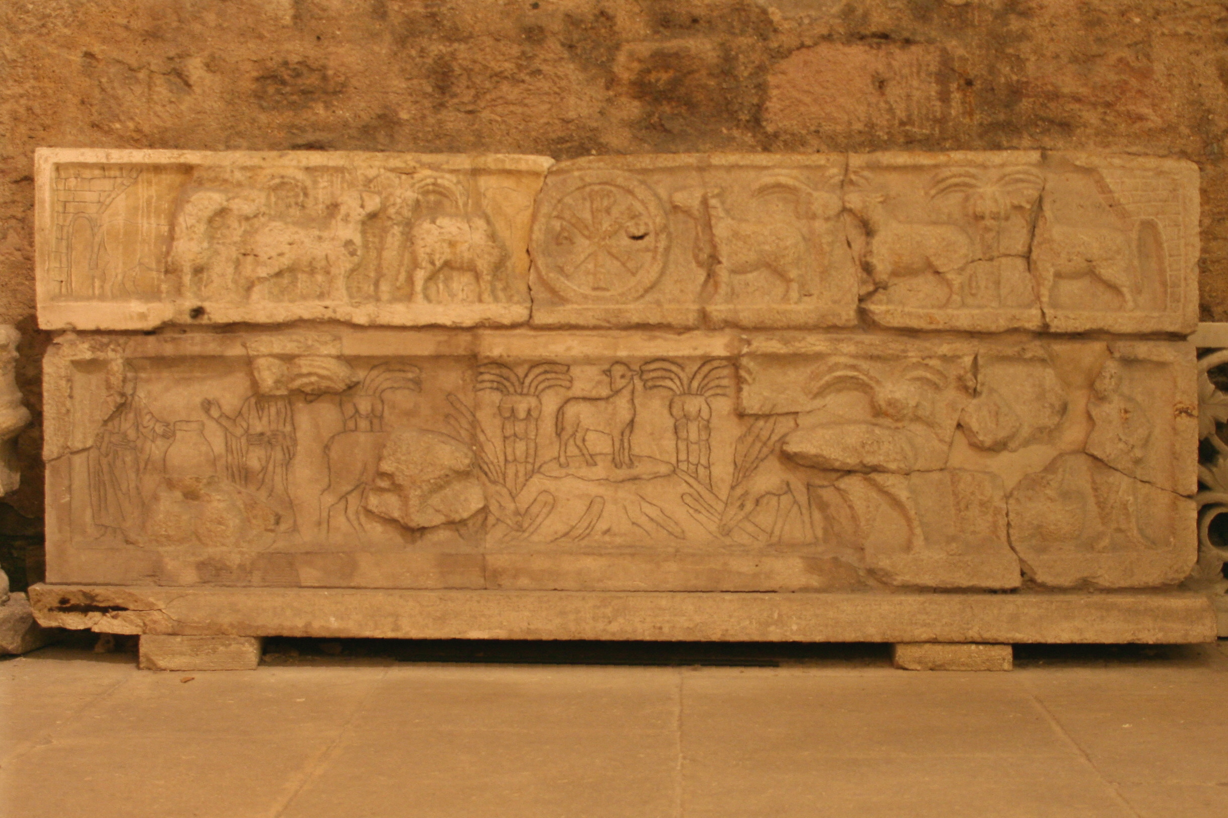 Sarcophage du Ve siècle représentant des brebis et des cerfs avec au milieu l'agneau divin. Il se trouve dans les cryptes de l'abbaye de Saint-Victor à Marseille.